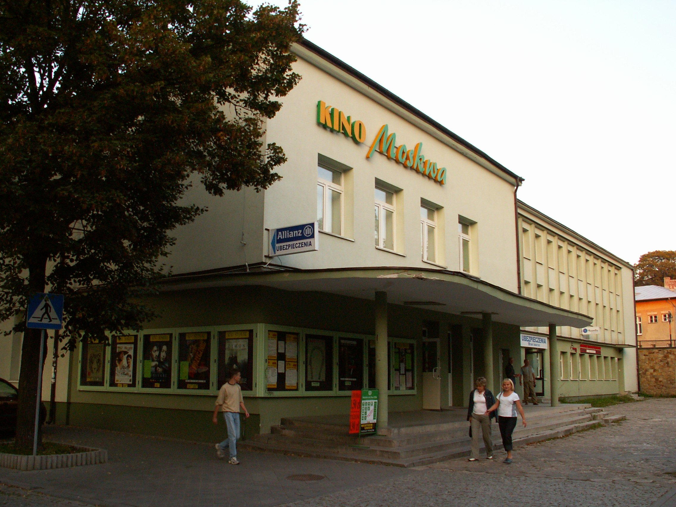 Moskwa Cinema in Kielce (Poland)